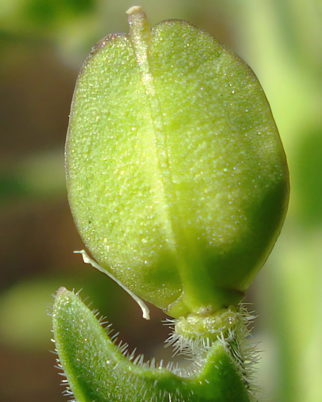 Lepidium campestre (Unterfranken, Germany)